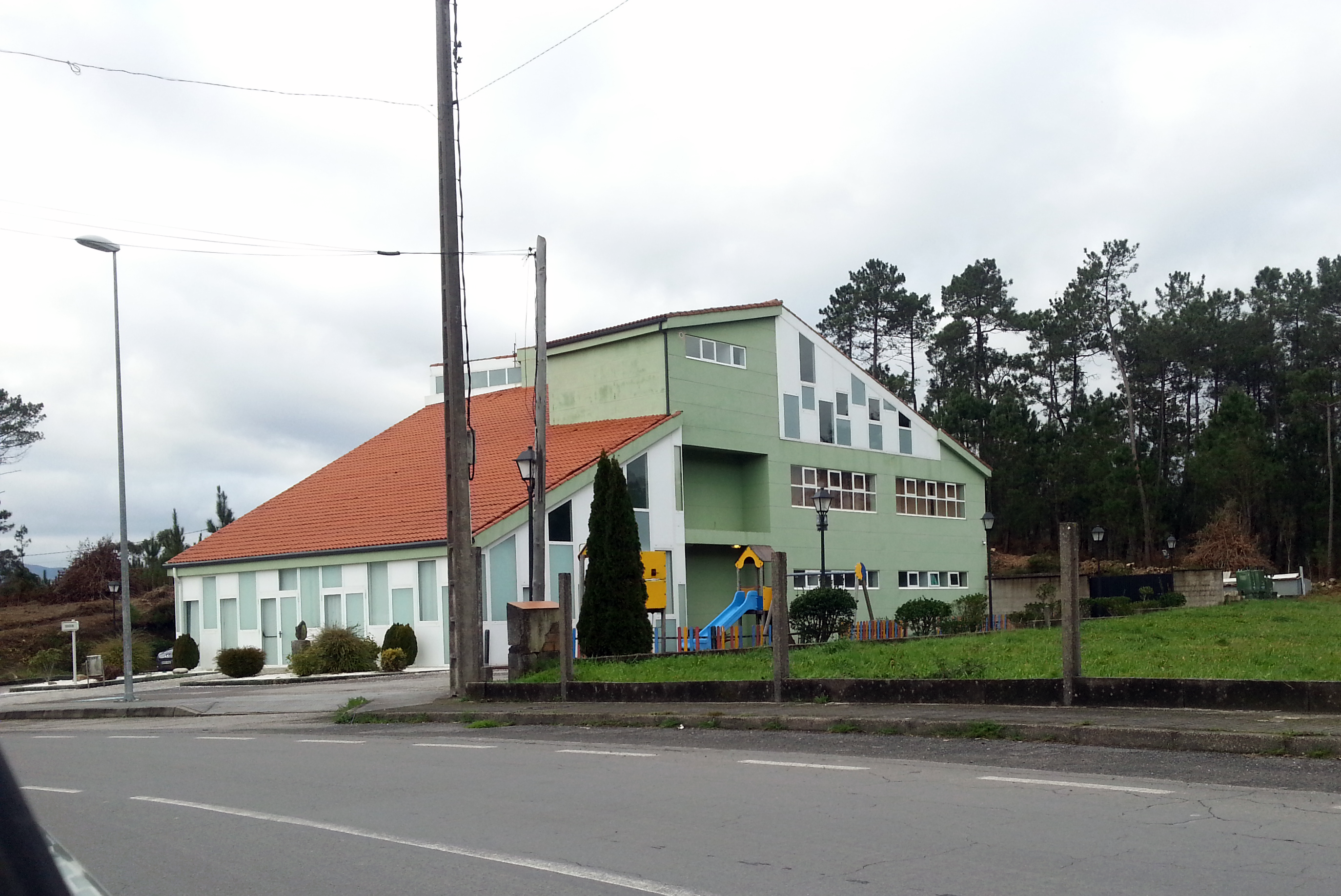 Casa da cultura de Lousame, Galicia, España